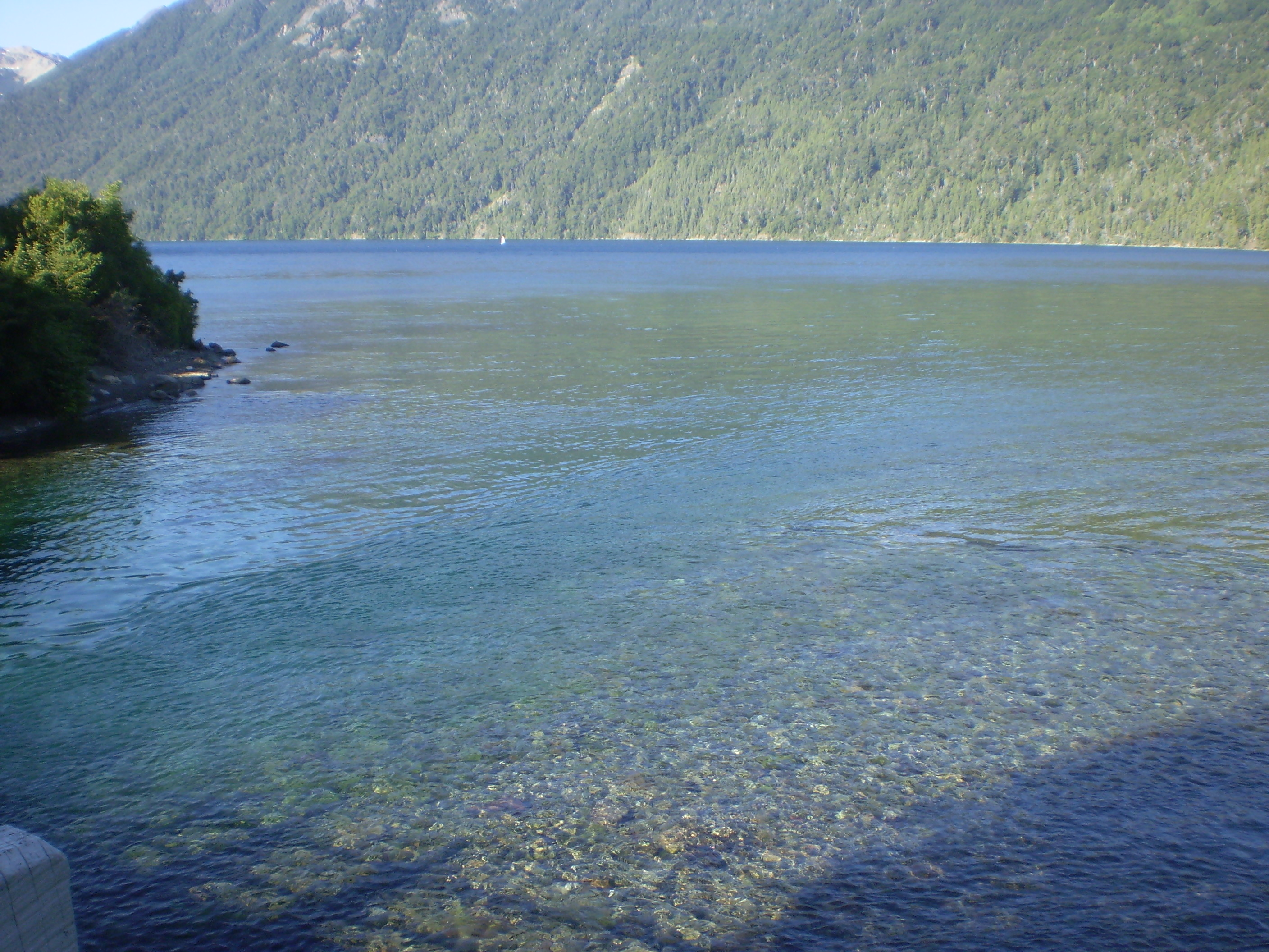 Lago Correntoso en Villa La Angostura, Neuquén, Argentina